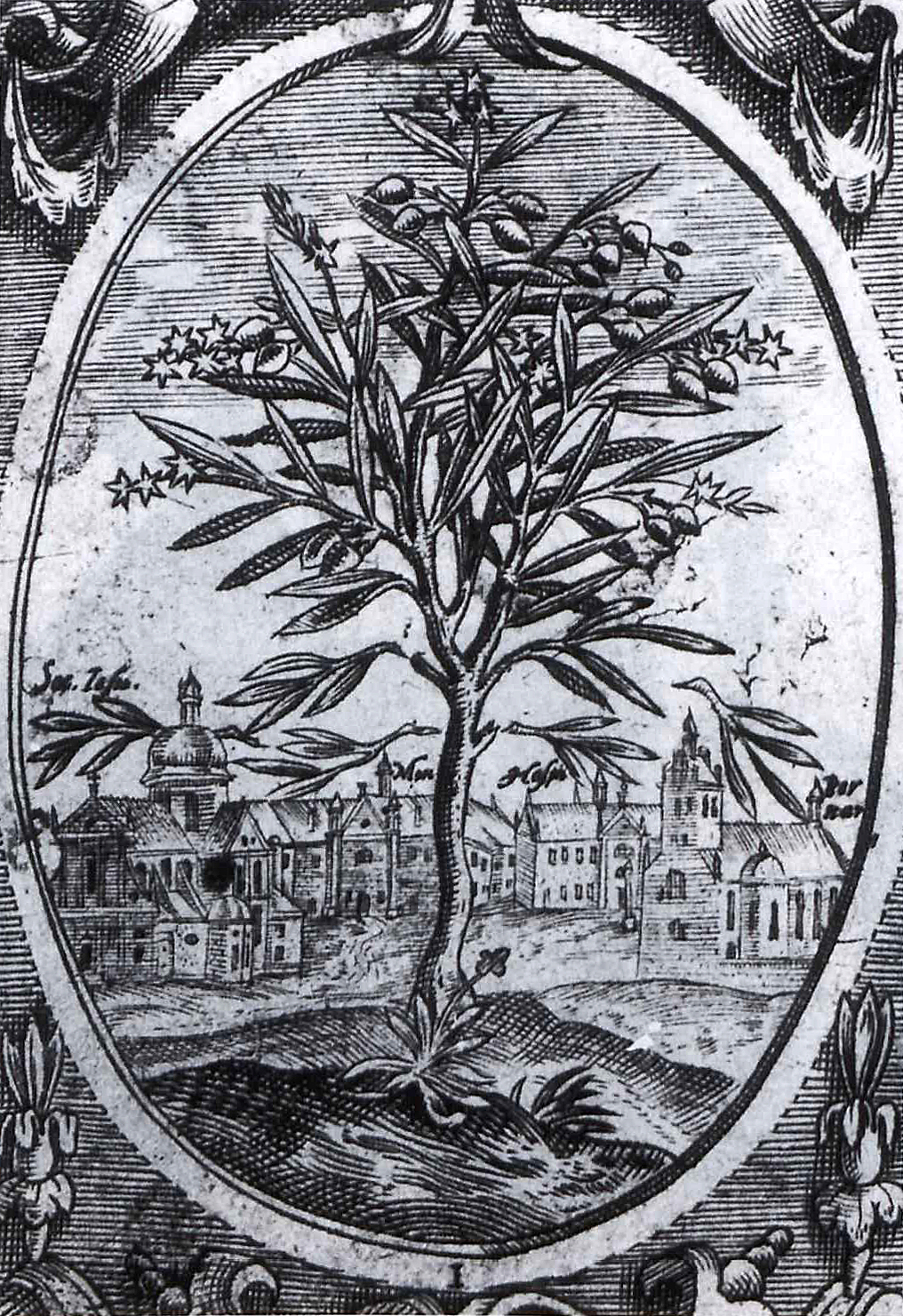 Беларуская (тарашкевіца): Нясьвіж. Касьцёлы езуітаў, бэнэдыктынак, бэнэдыктынаў і бэрнардынаў